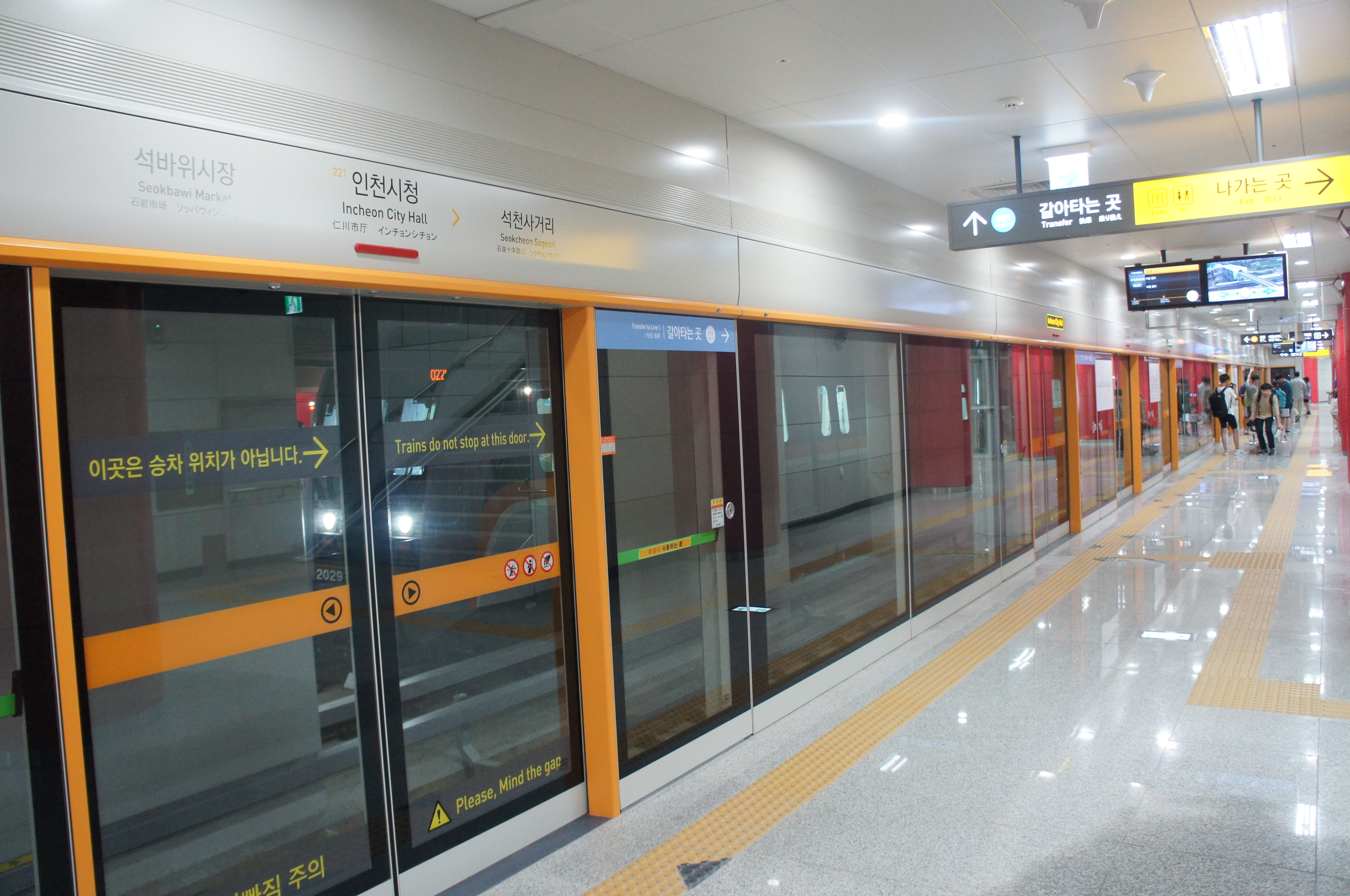 인천2호선 인천시청역 승강장